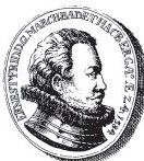 Markgraf Ernst Friedrich von Baden-Durlach um 1584